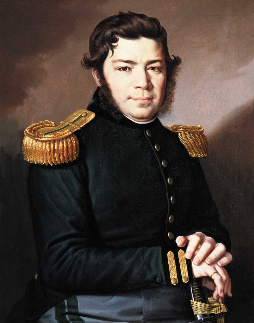 Antonín Machek - portrét muže zrodiny Patočků